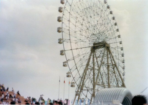 科学万博 - Technocosmos